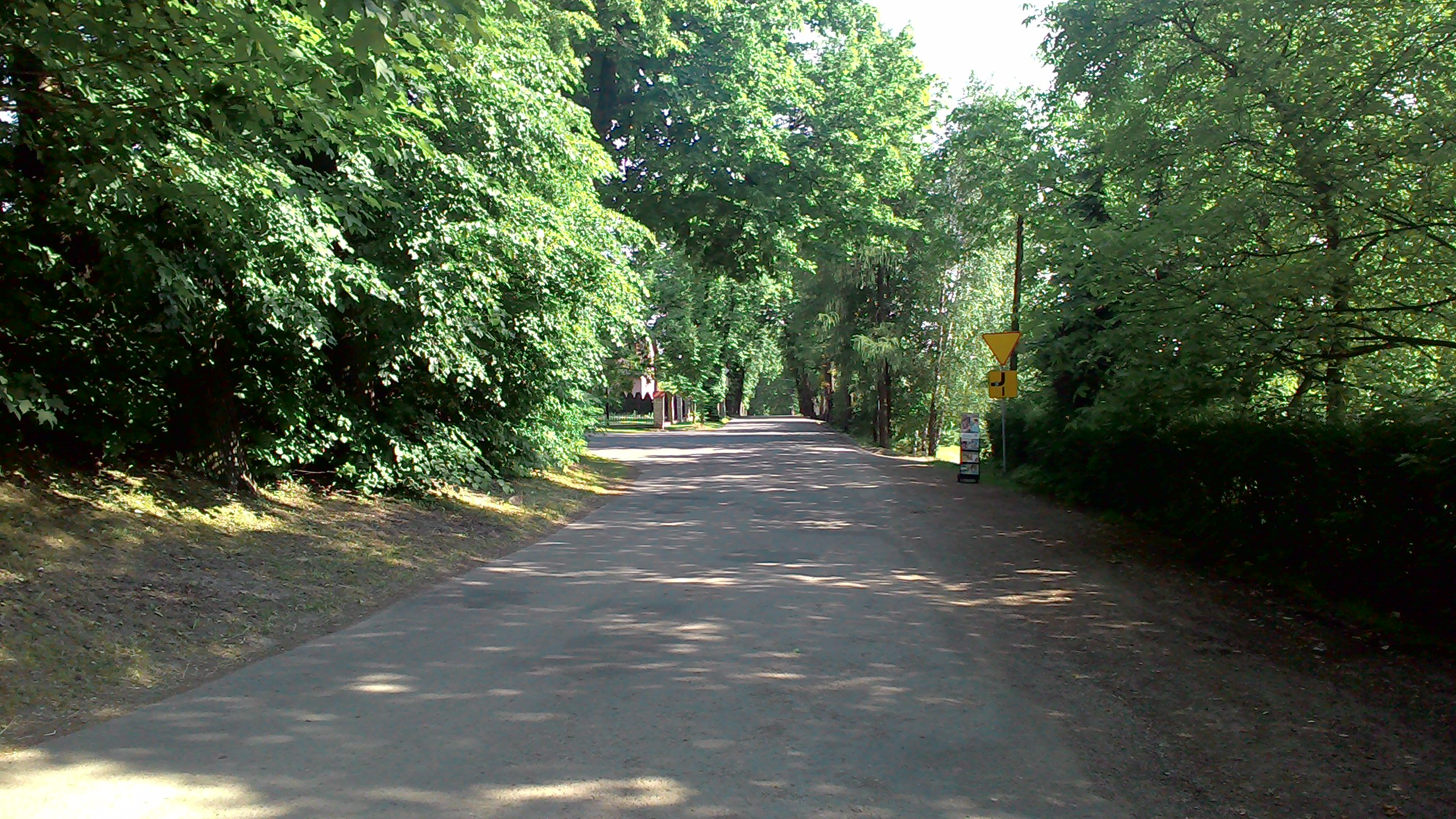 Dwór Sanka, aleja